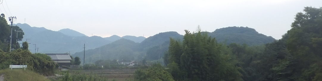 六甲山地西側